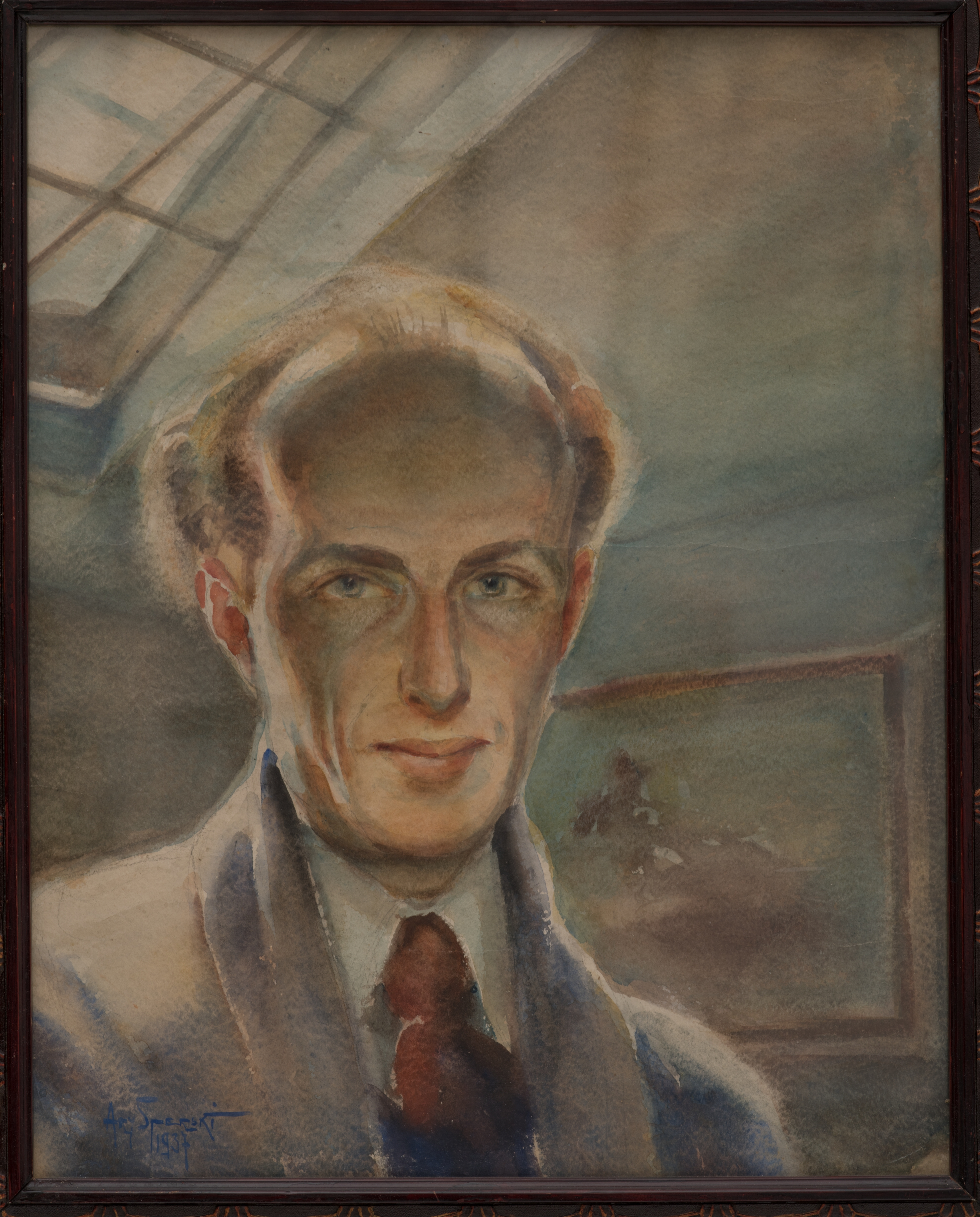 Autoportret